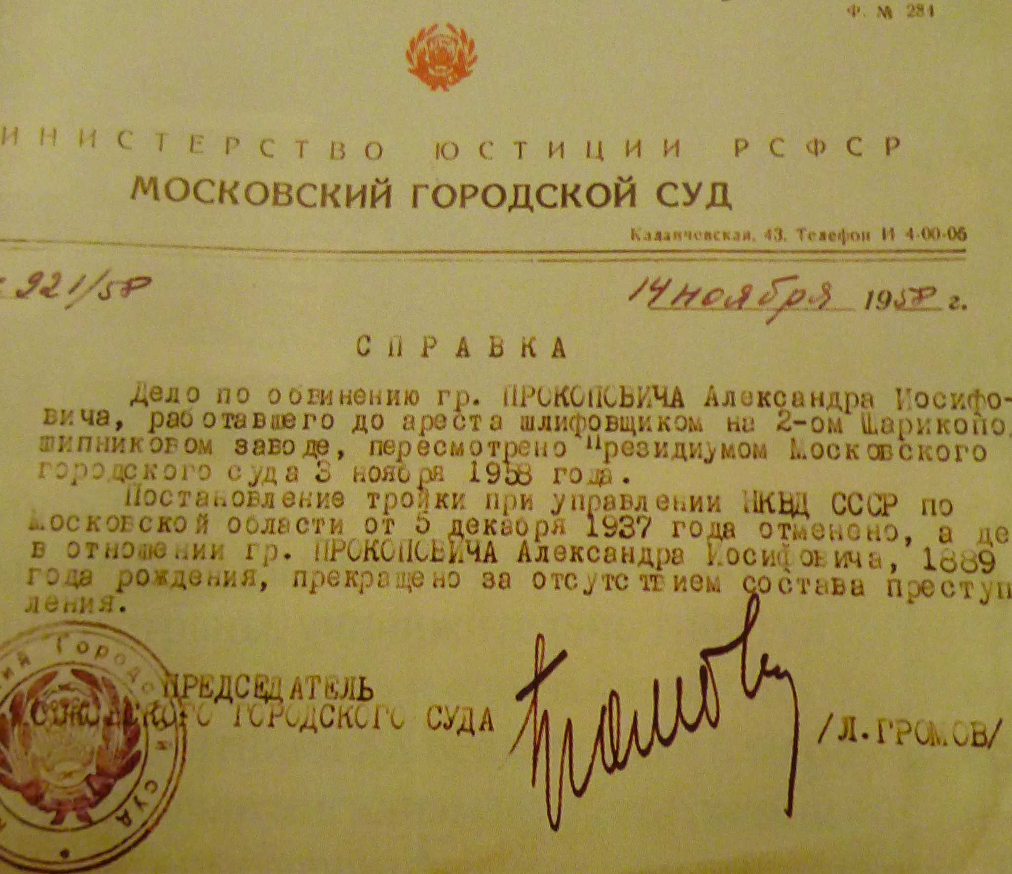 Справка о реабилитации Александра Иосифовича Прокоповича Московский городской суд 14 ноября 1958 года